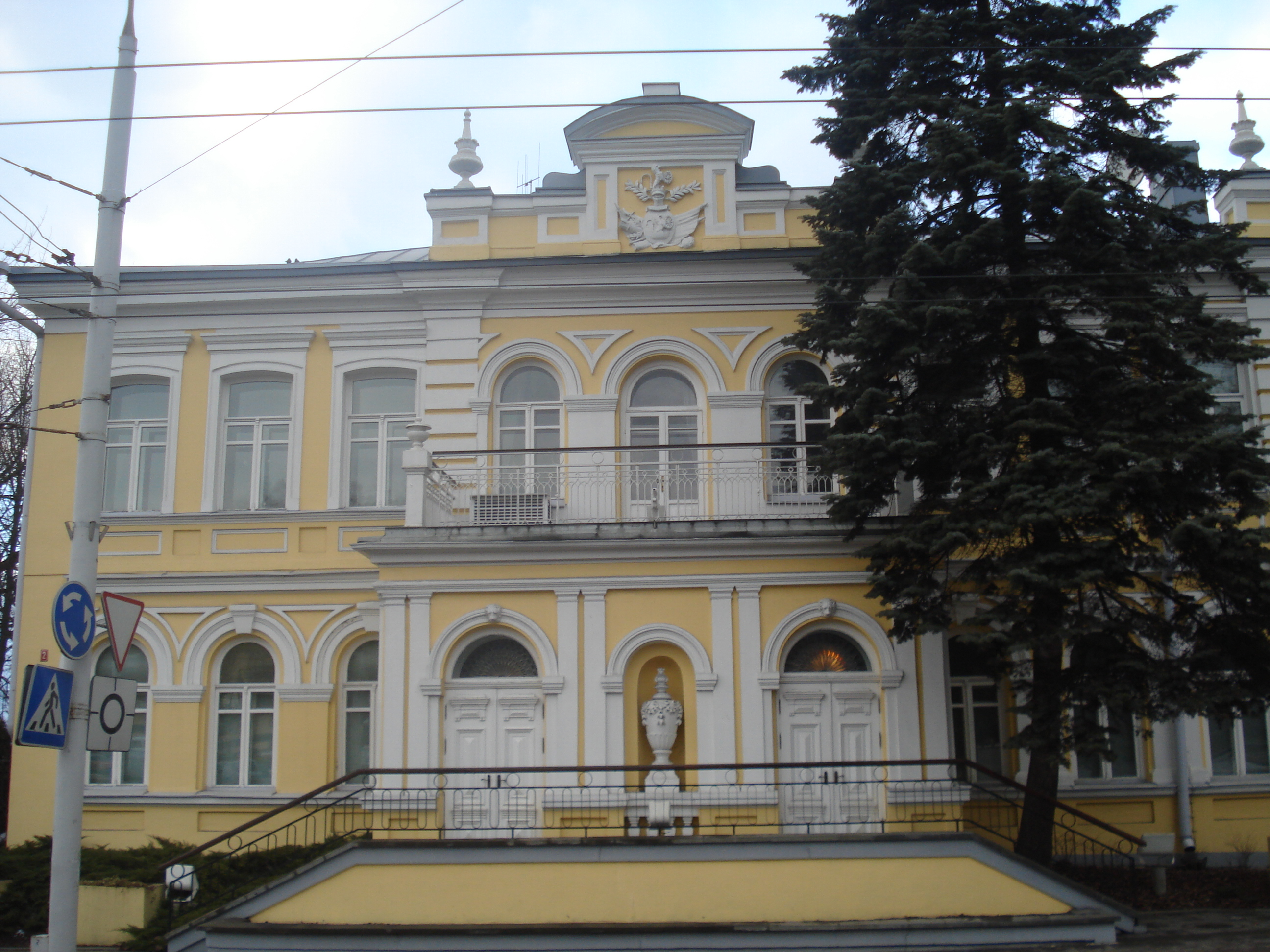 British Embassy in Vilnius (Antakalnio 2)